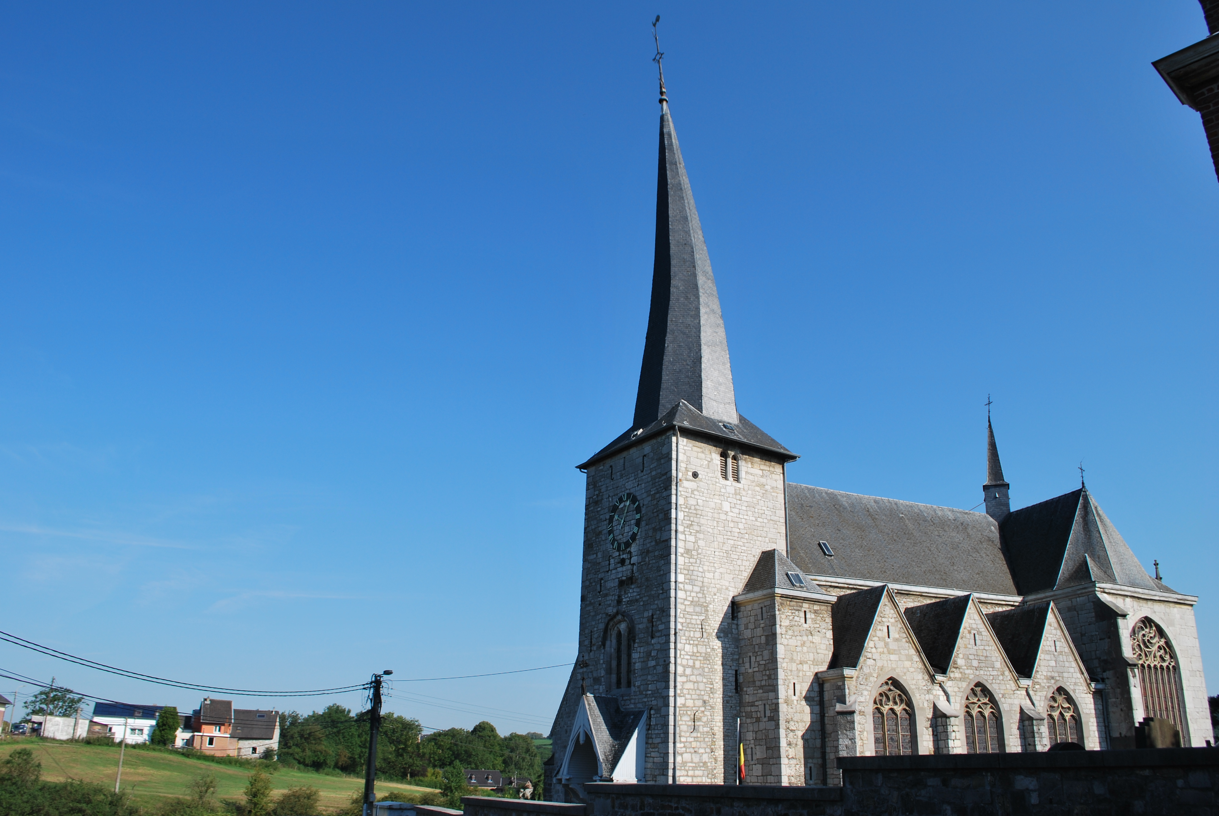 Un bel exemple de clocher tors que l'on rencontre souvent dans la région This photo of immovable heritage has been taken in the Walloon Region